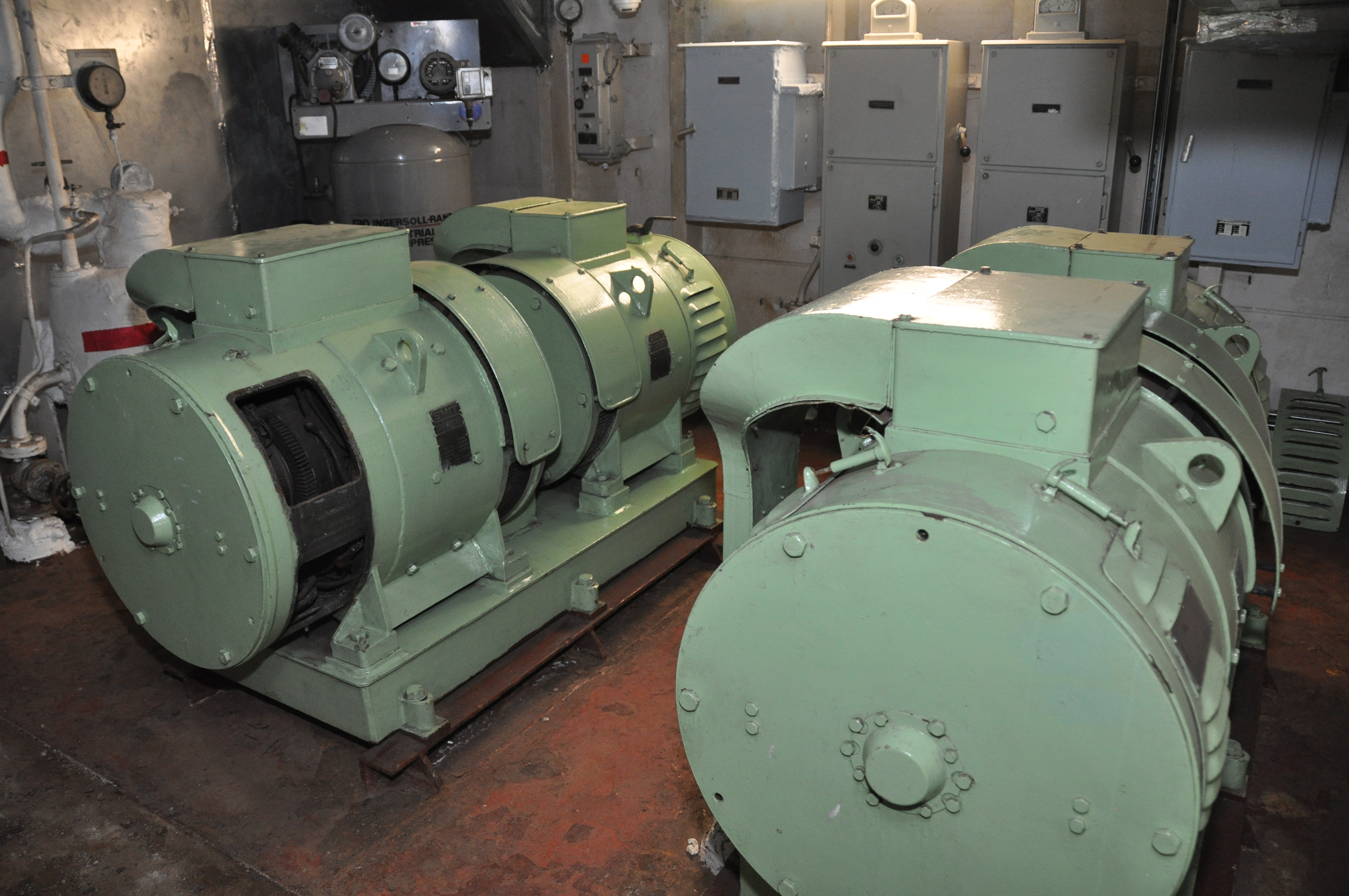 De ROTTERDAM op haar ligplaats in de Maashaven te Rotterdam